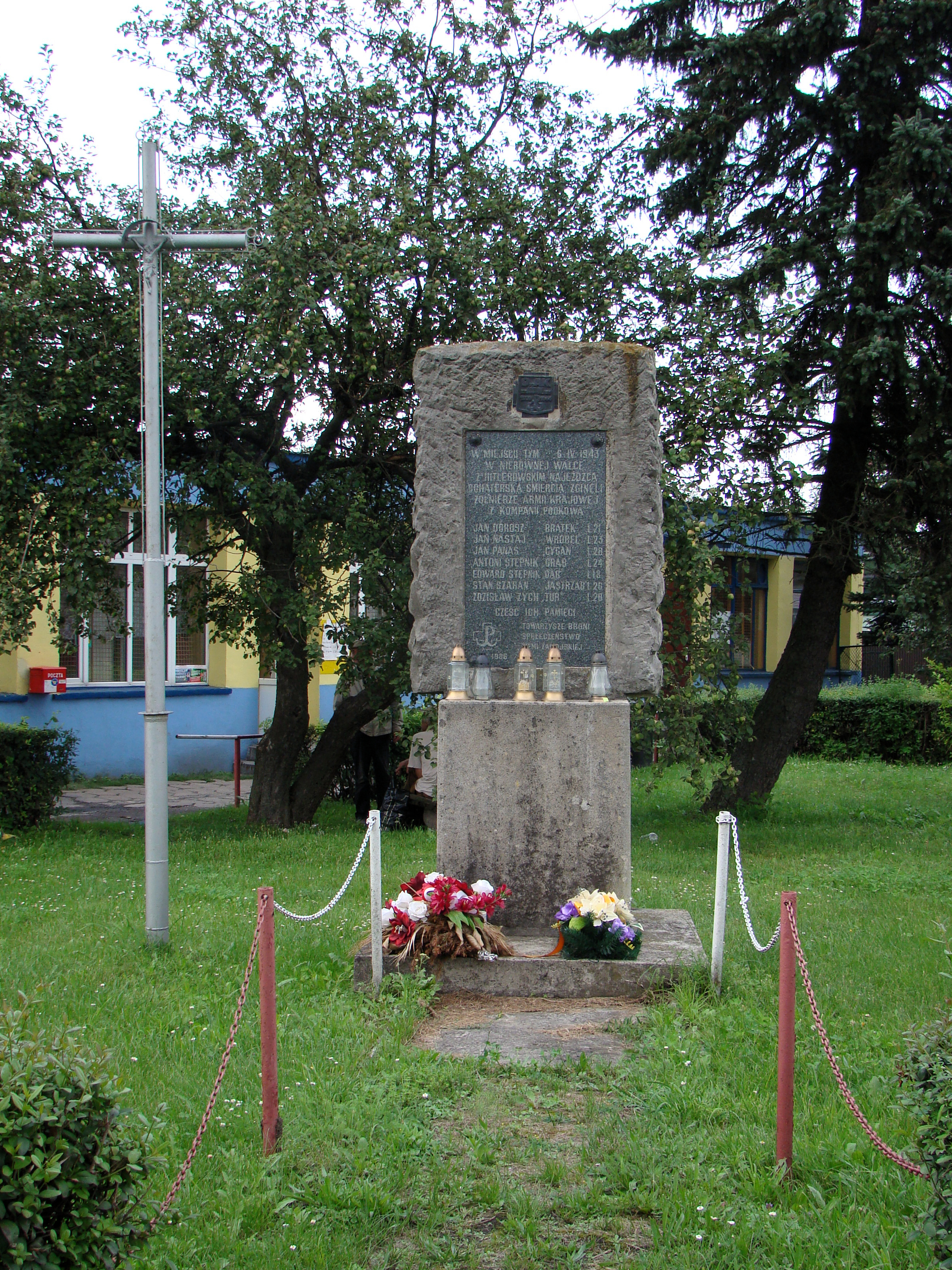 Památník v obci Deszkowice Pierwsze, Polsko